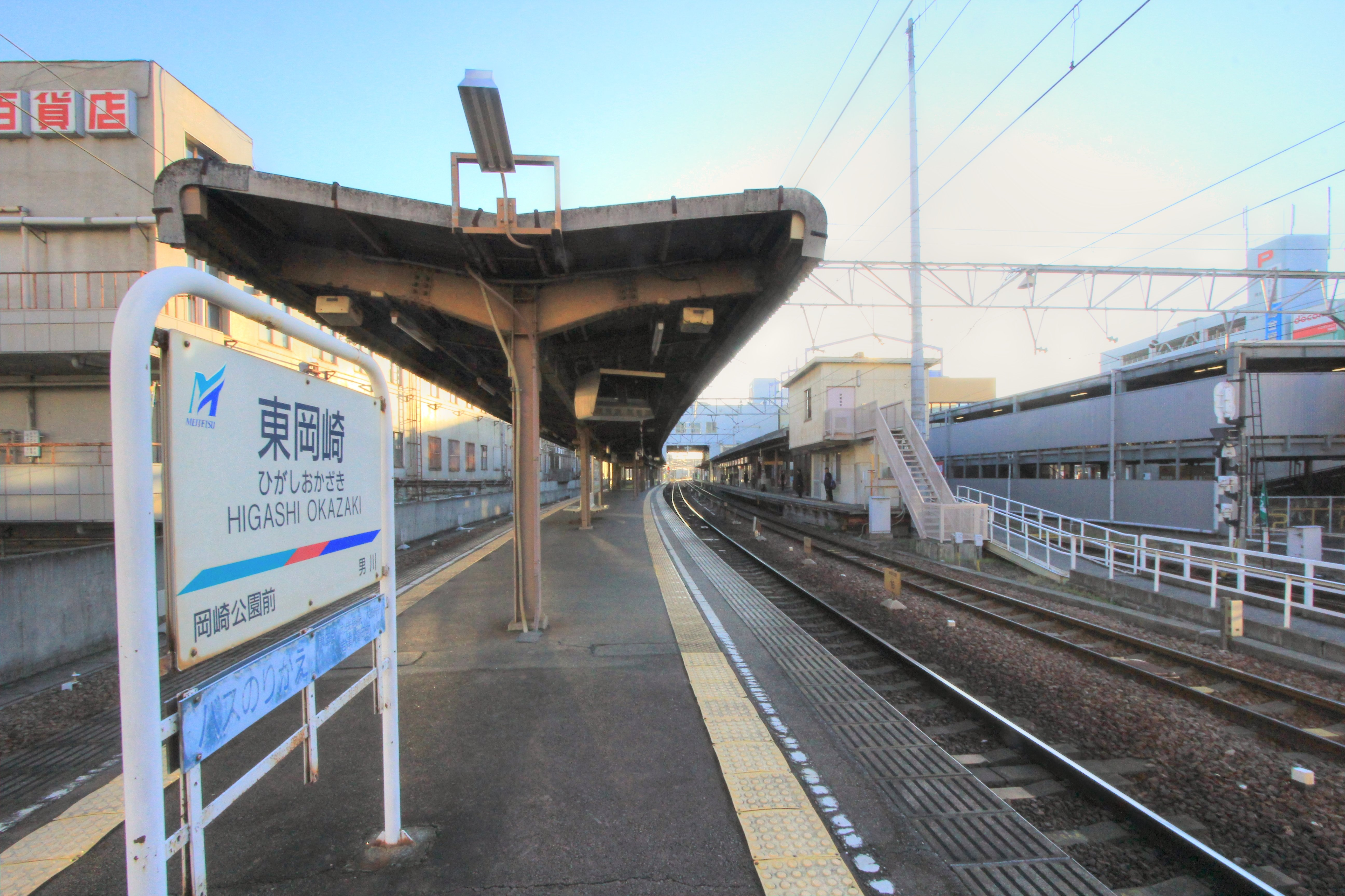 東岡崎駅